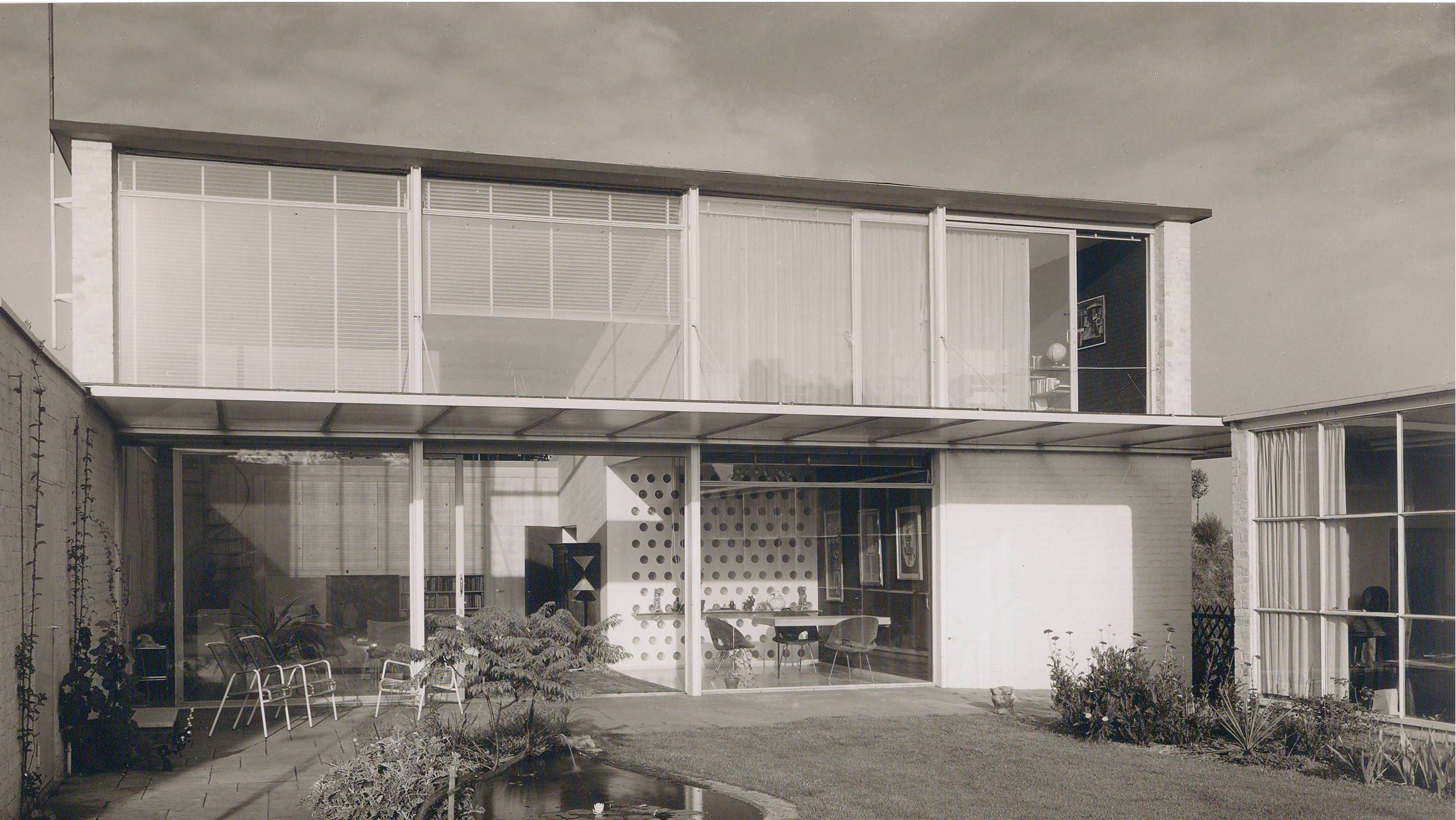 Haus Nakatenus in den 1960er Jahren. Kaiser-Friedrich-Ring 94 in Düsseldorf-Oberkassel. Es wurde 1954-1955 von Architekt Bernhard Pfau für die Bildhauerin Marianne Jovy-Nakatenus erbaut